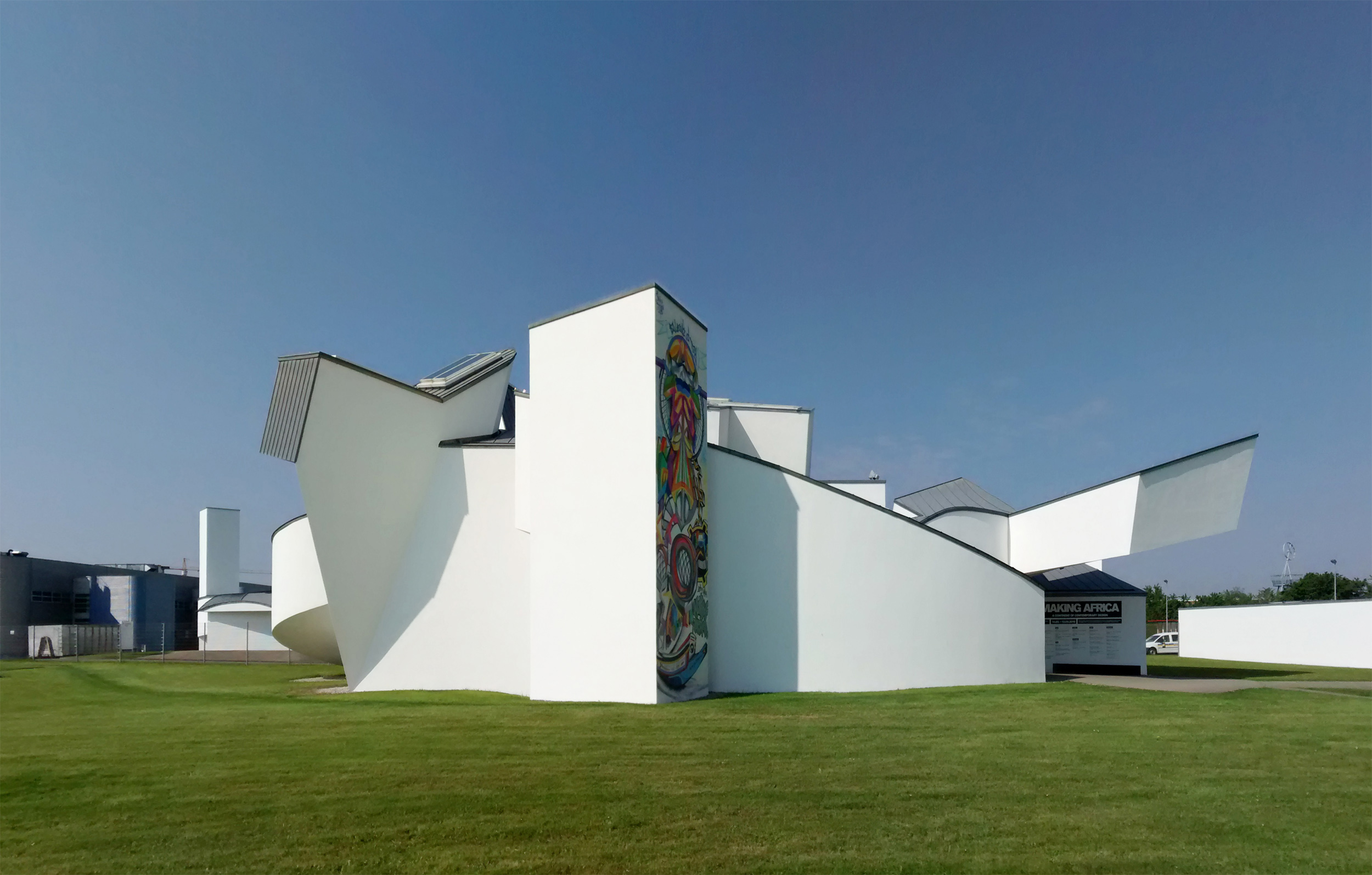 Vitra Design Museum, Frank Gehry, Weil am Rhein, Mai 2015